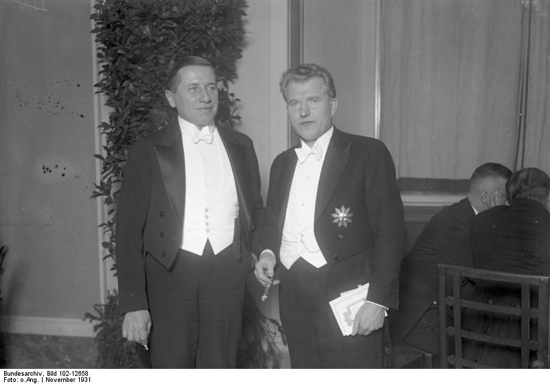 Littauischer Diplomatenwechsel in Berlin! Der langjährtige Littauische Gesandte in Berlin, Sidsikauskas, wurde von seinem Posten abberufen. Reichspräsident von Hindenburg empfing den scheidenden Gesandten zur Abschieds-Audienz.